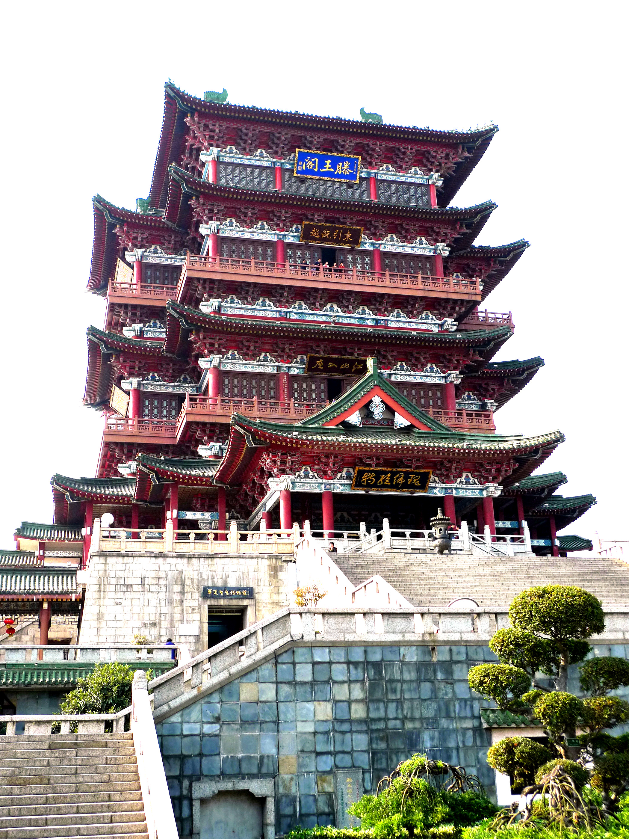 南昌腾王阁